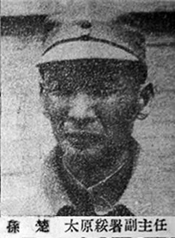 孙楚，晋绥军高级将领